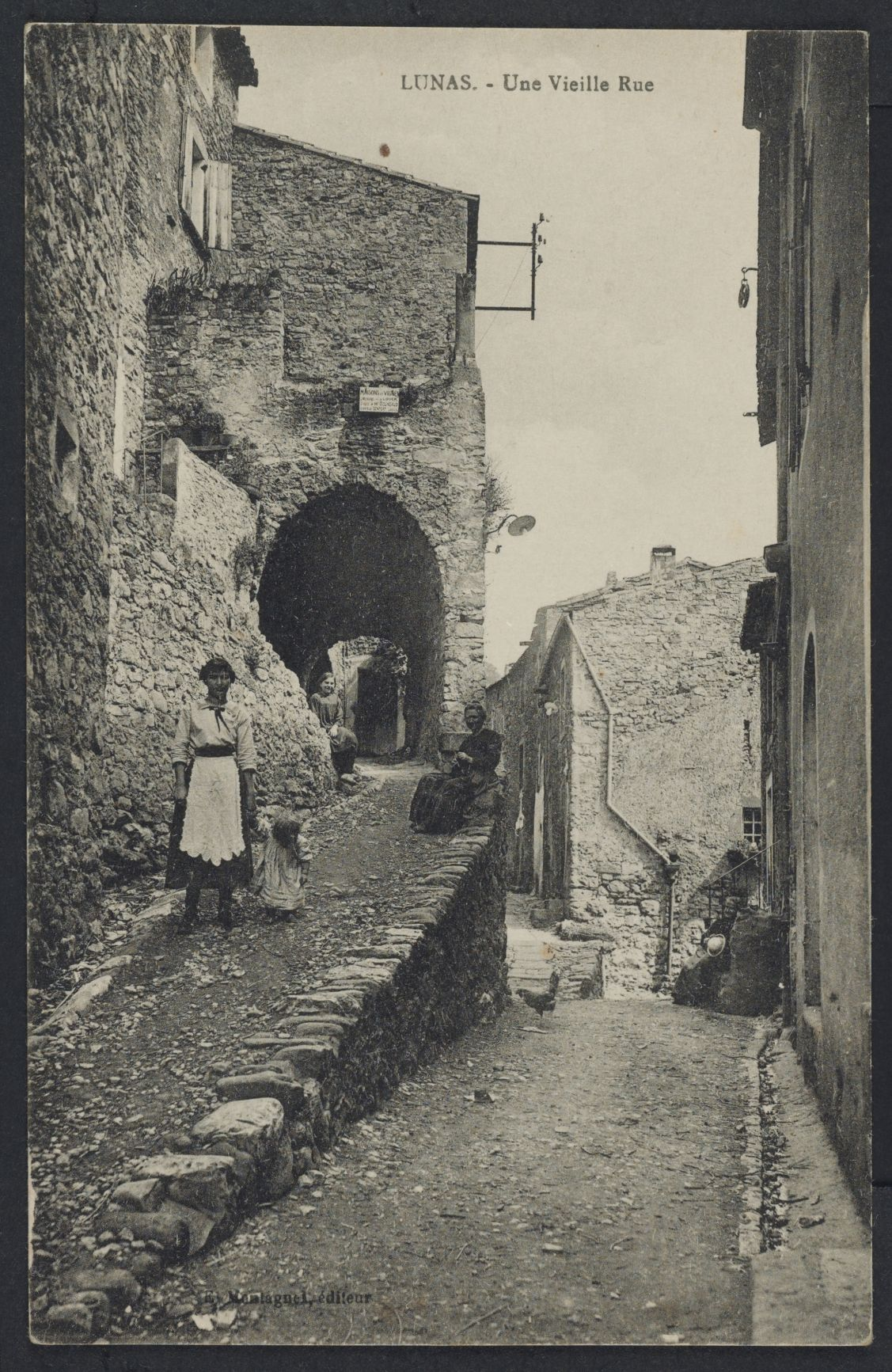 Lunas. - Une vieille rue : carte postale.